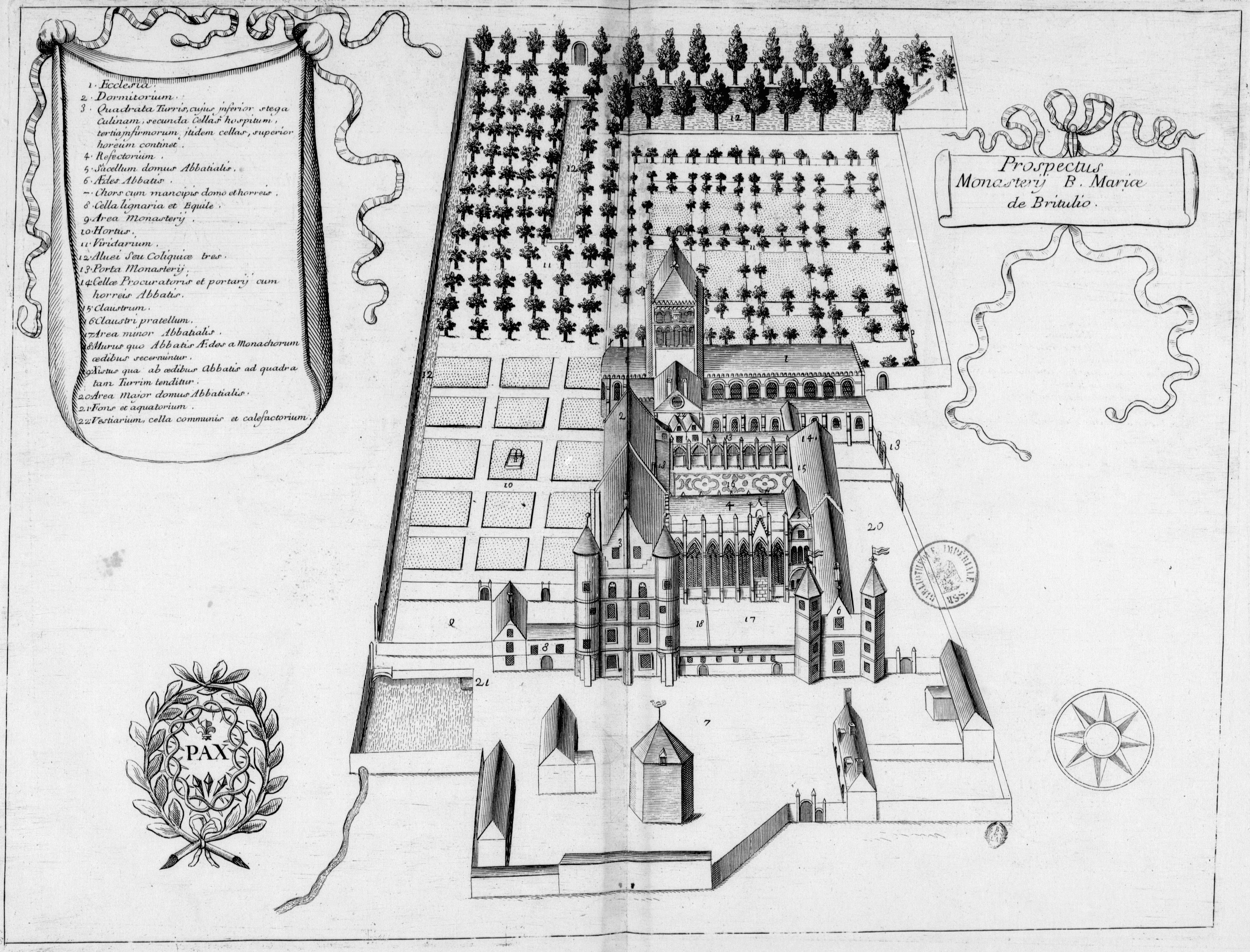 Planche gravée du 17ème siècle représentant le prieuré Notre-Dame de Breteuil, dans le livre Monasticon Gallicanum.